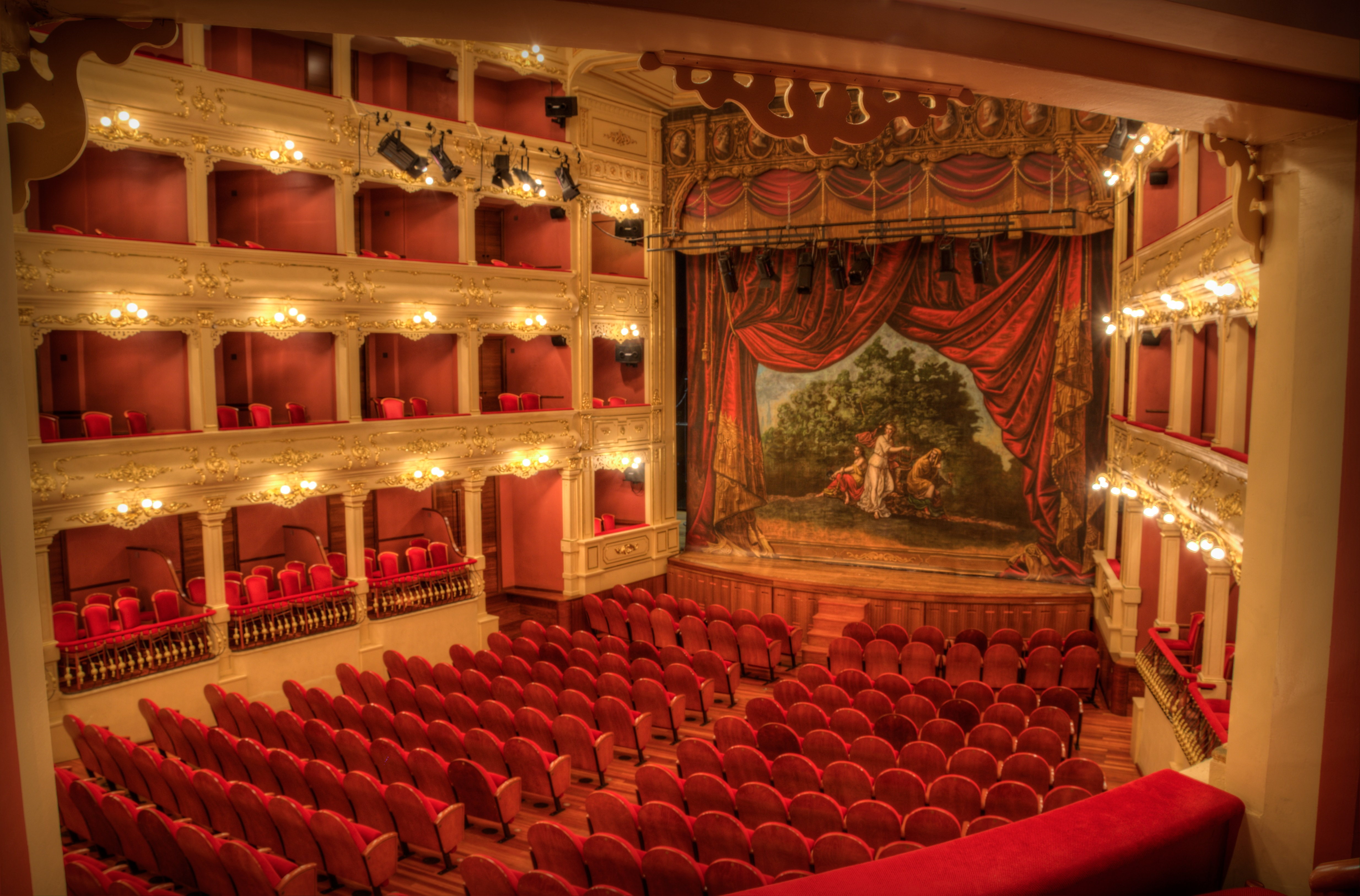 Foto: Teatro Principal de Maó (Autor, Carlos Moreno)